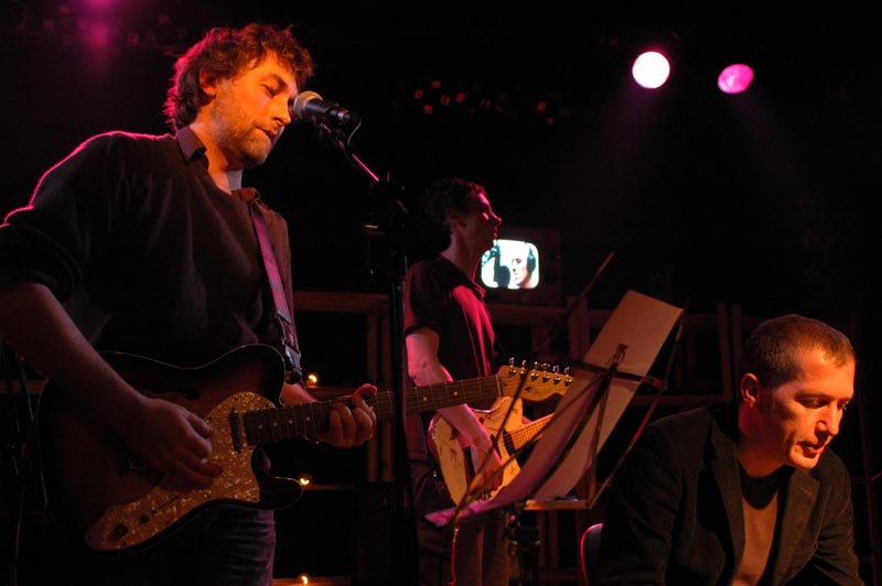 Yann Tiersen avec Christophe Miossec au Vauban, Brest, France